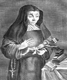 Gravure de Maria Petiyt, carmélite (1623-1677)